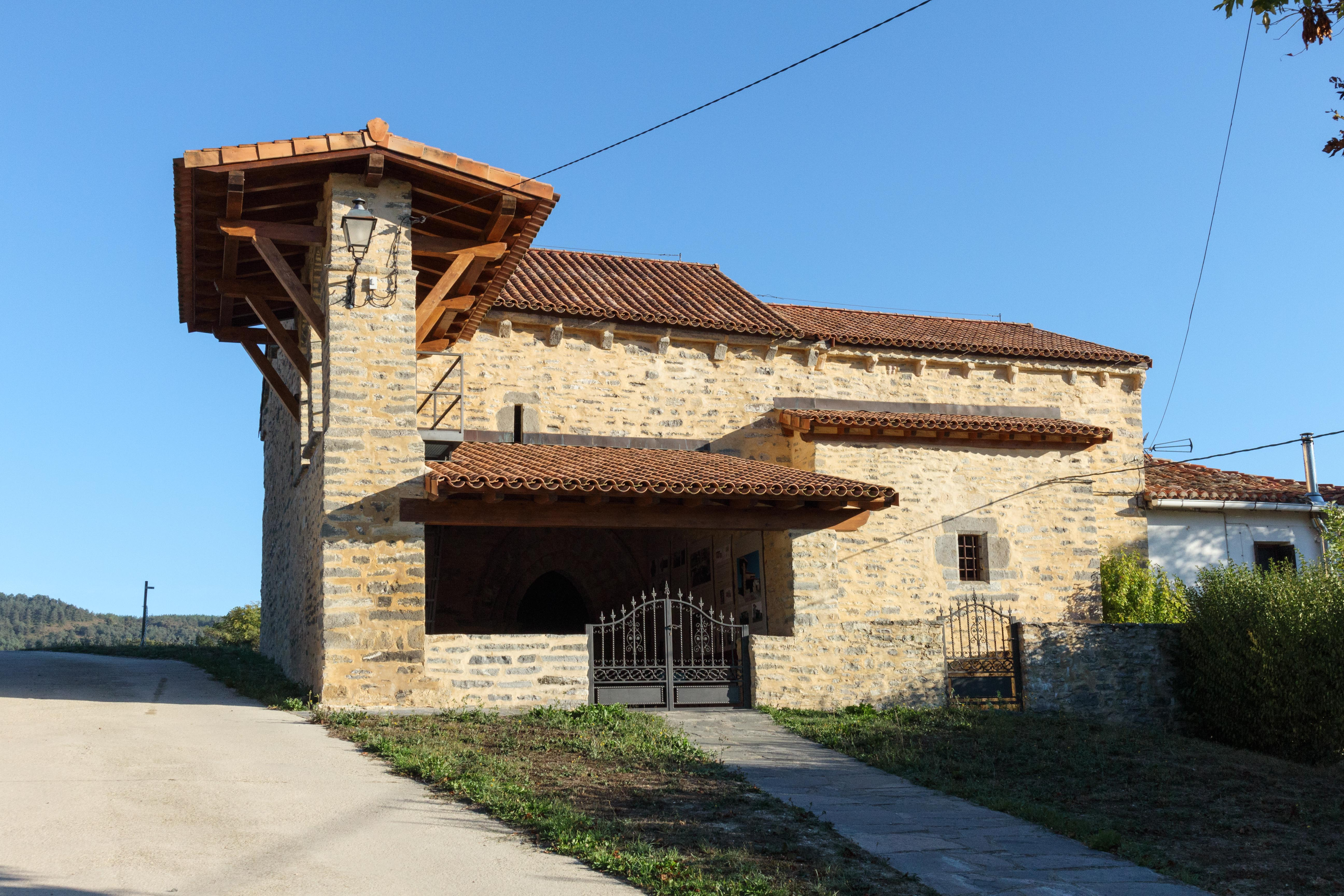 Artxuako San Sebastian eliza